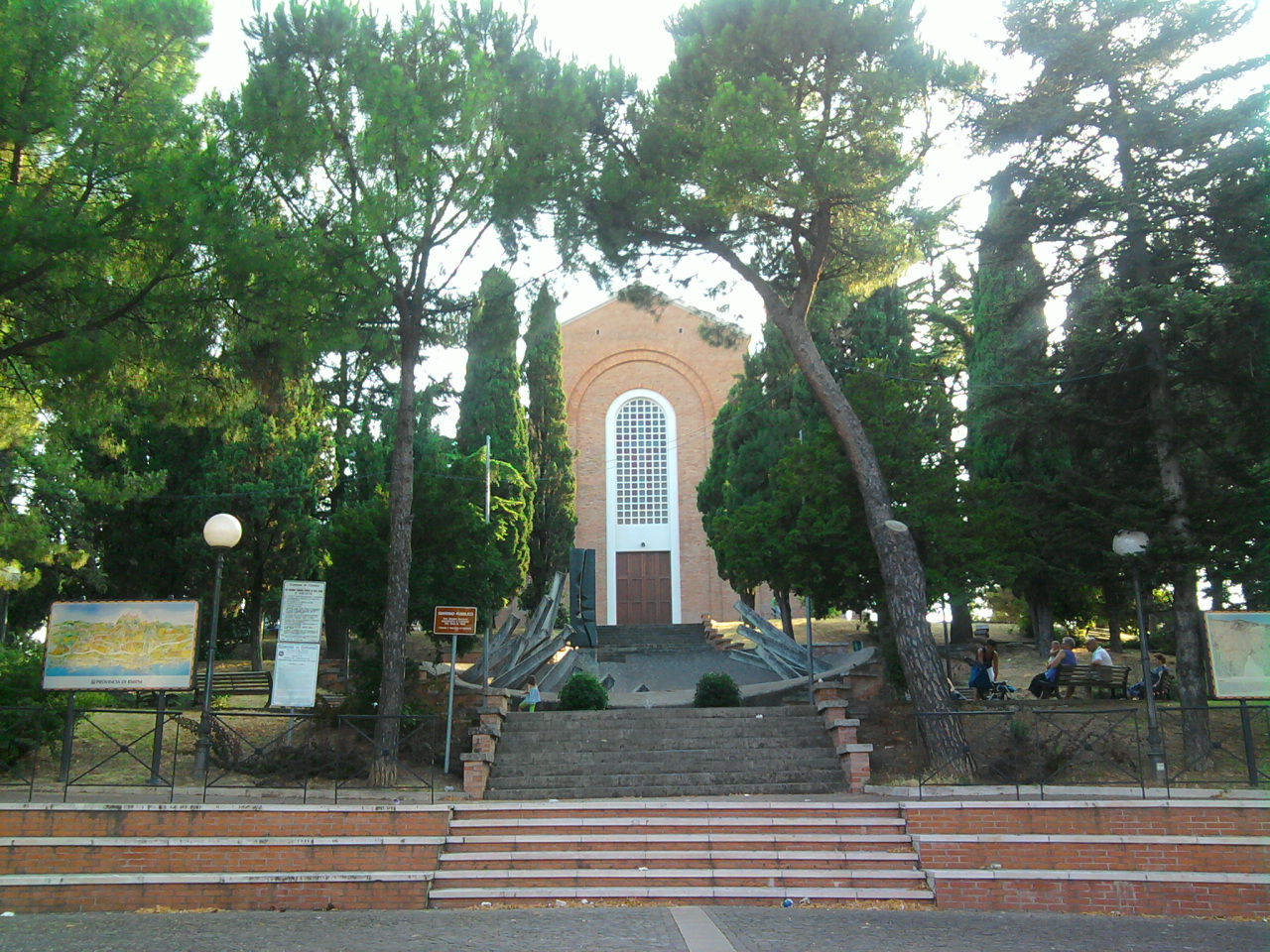 Coriano (RN), Chiesa Parrocchiale Santa Maria Assunta